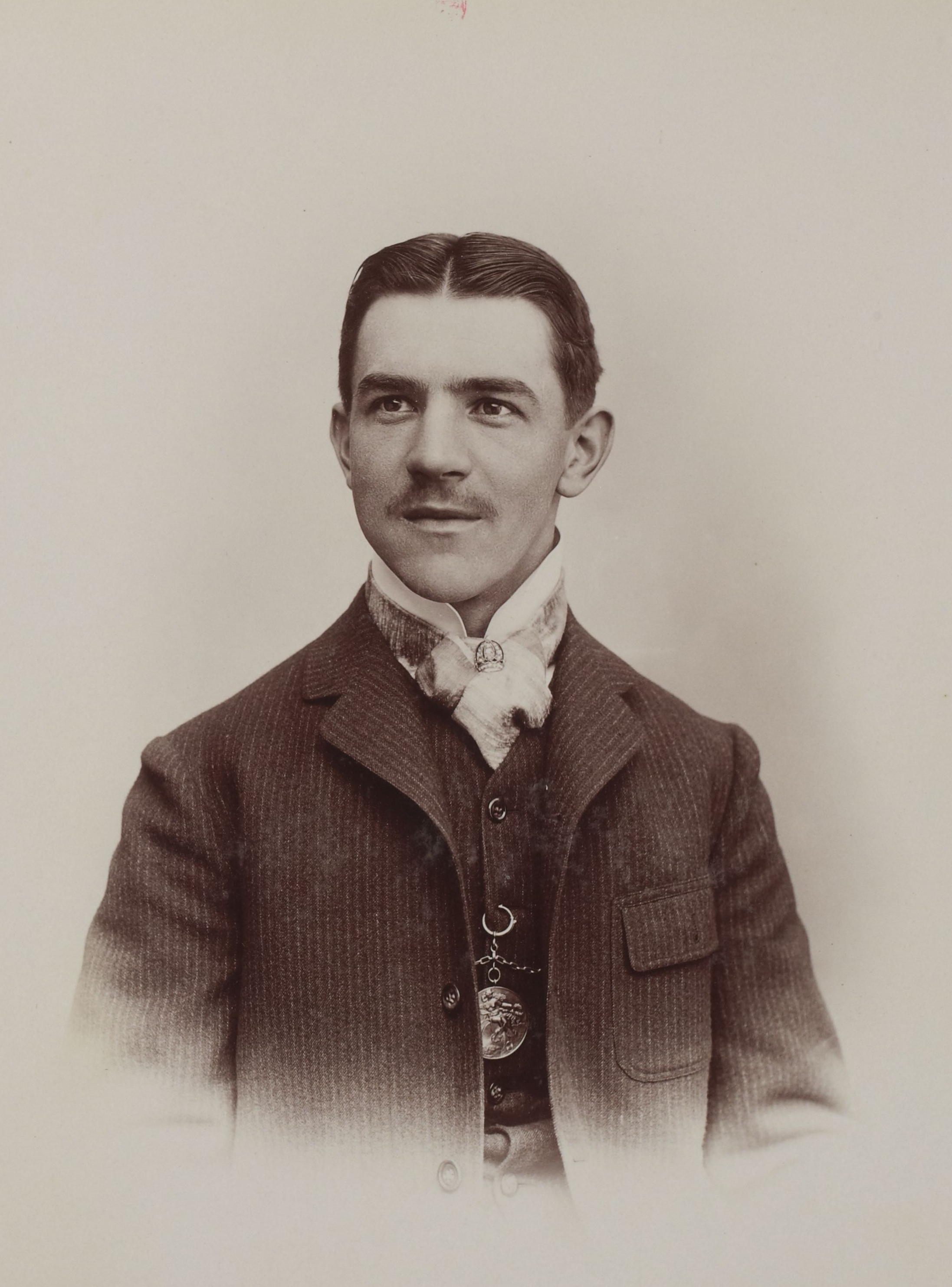 [Collection Jules Beau. Photographie sportive] : T. 18. Année 1902 / Jules Beau : F. 49. Robl